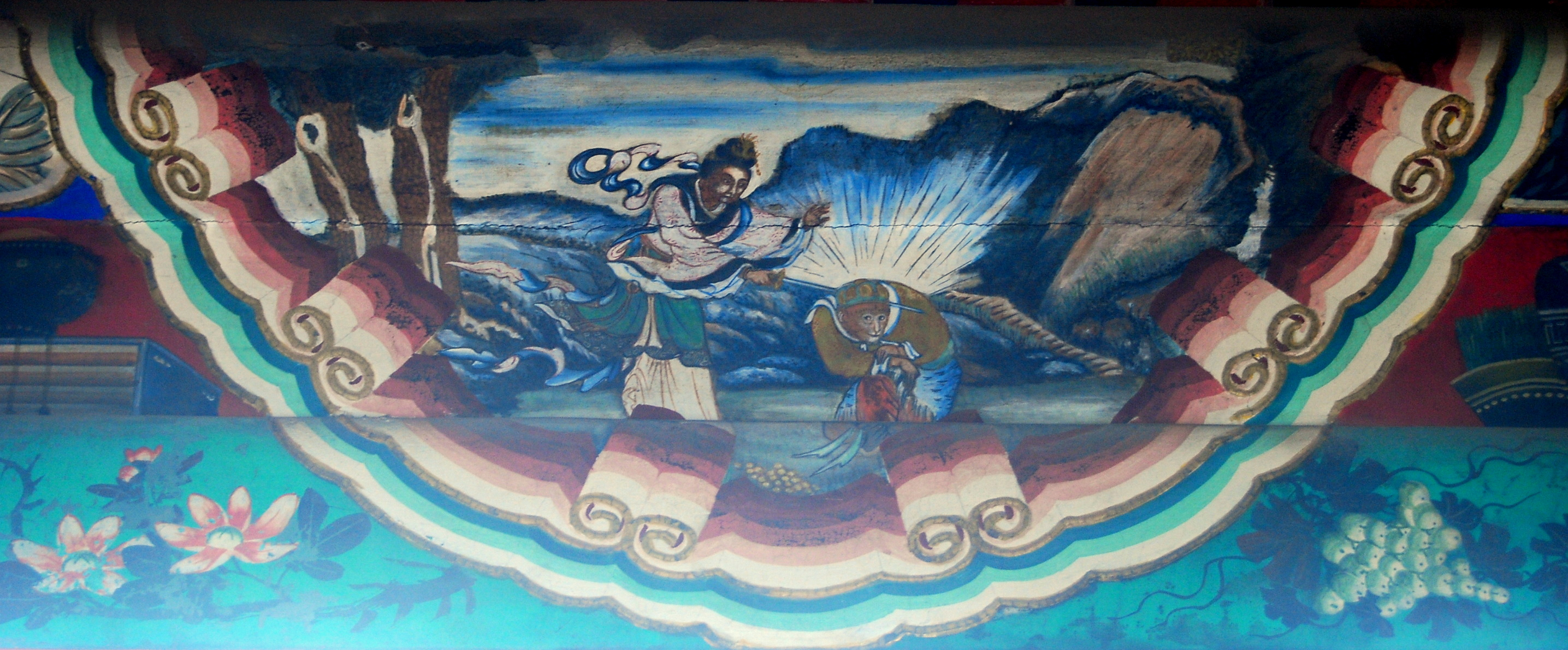 颐和园长廊彩绘：三借芭蕉扇之罗刹女